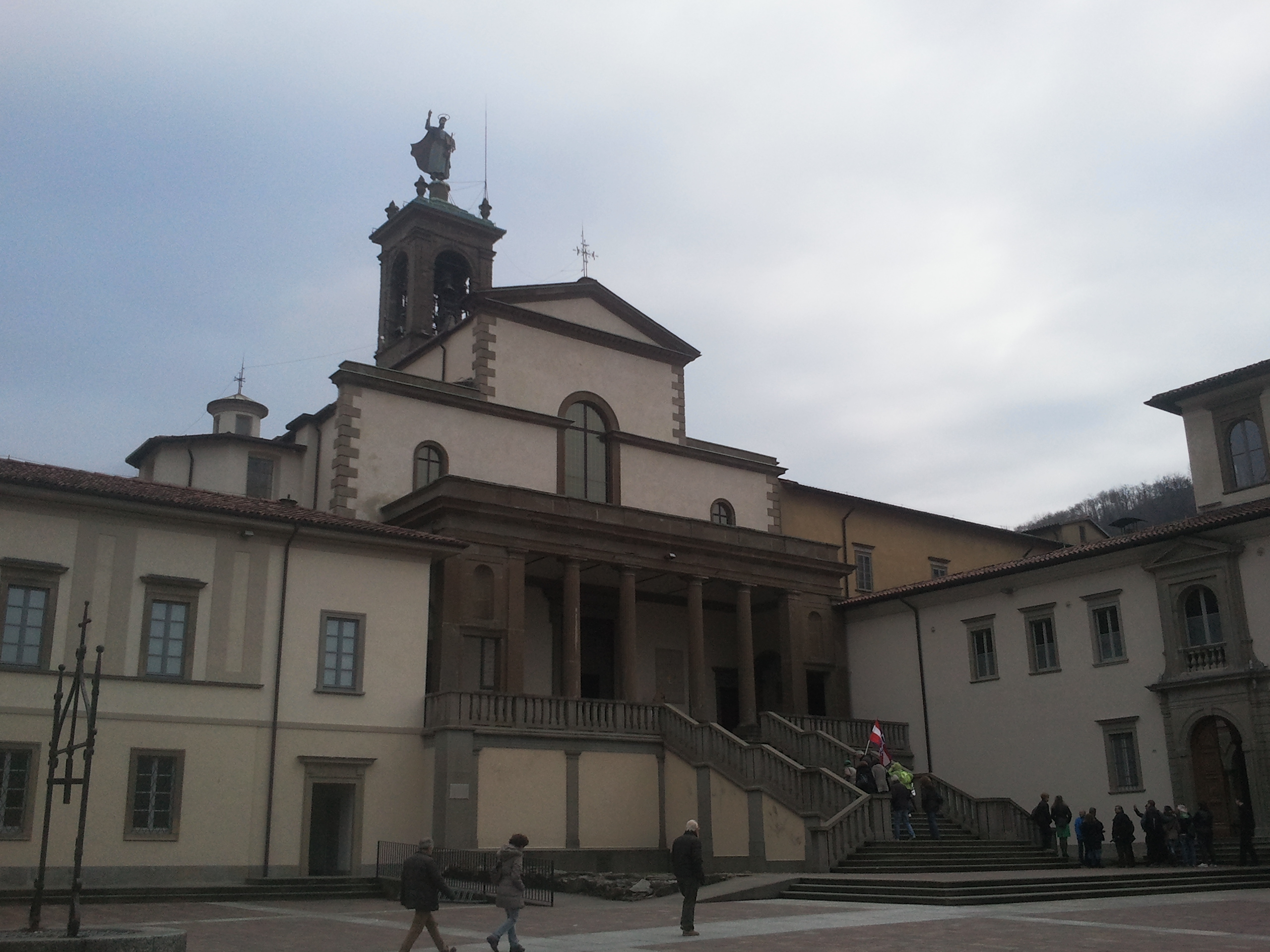 Vista dell'ingresso dell'abbazia di Pontida dal sagrato.